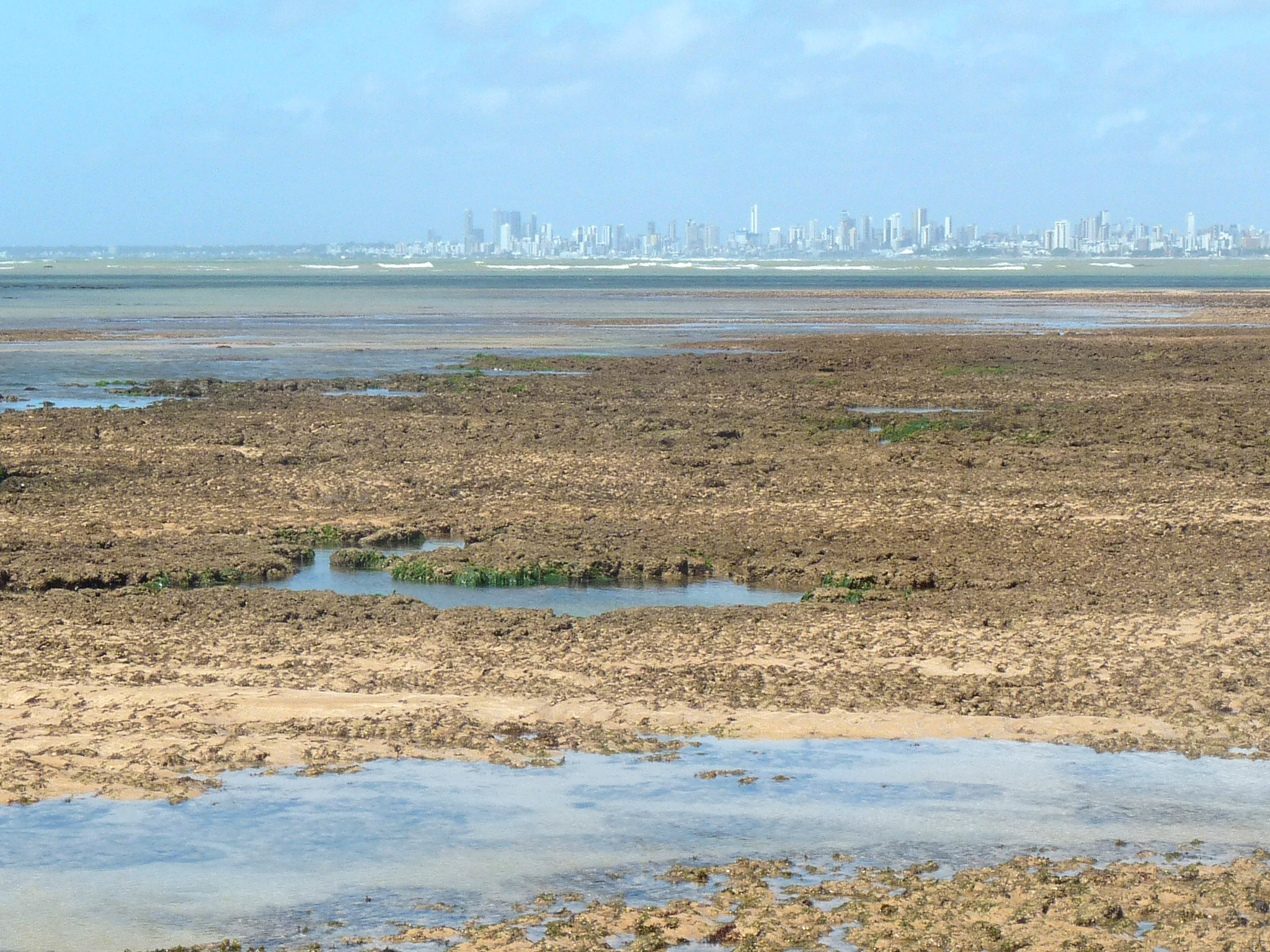 Ilha que surge e desaparece com a maré, objetiva conservar a biodiversidade associado aos recifes de corais